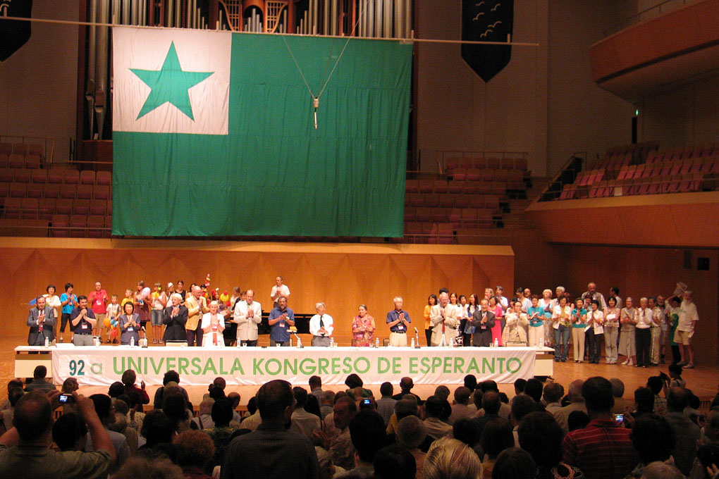 Solena fermo de la 92-a Universala Kongreso de Esperanto en 2008 en Jokohamo.